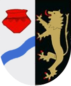 blazono de la komunumo Niederkumbd en Germanio